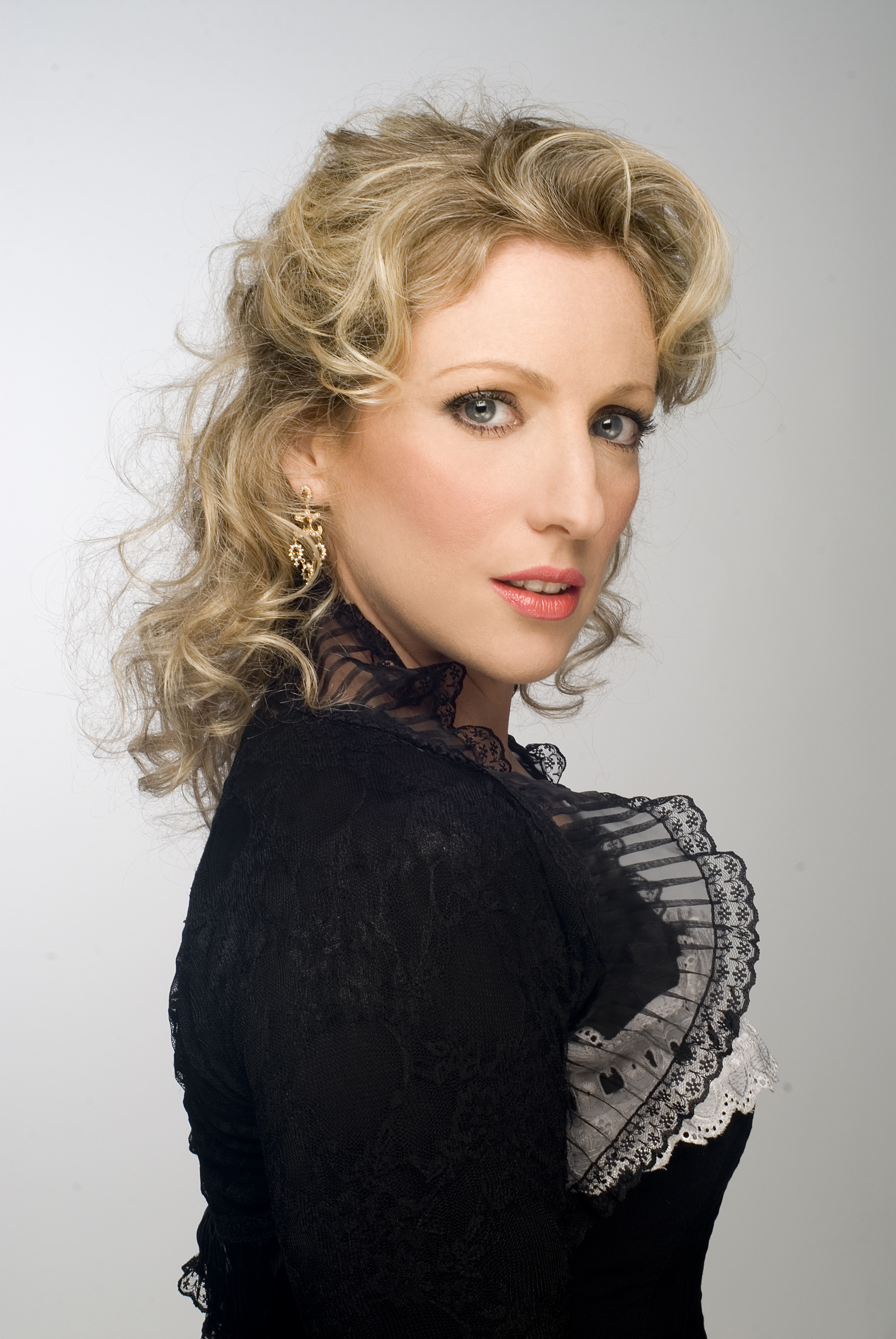 עדי ארד